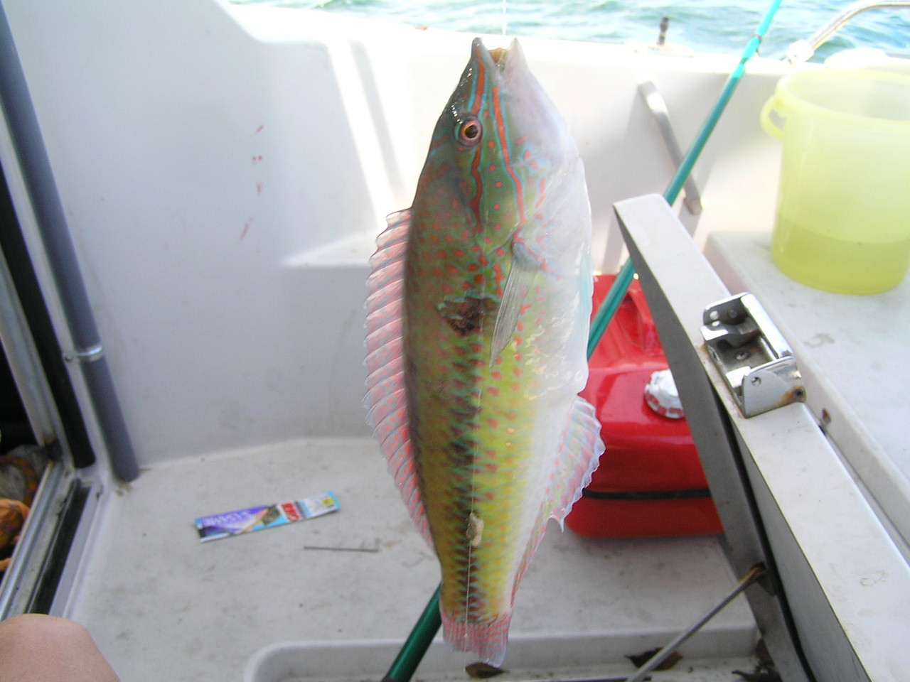 釣り上げられた青ベラ